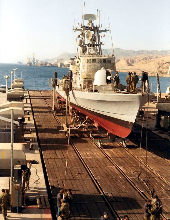 אח"י געש בסינקרוליפט יורדת למים לאחר סיום התיקונים במספנת אילת.